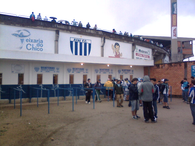 Bilheterias da Ressacada.